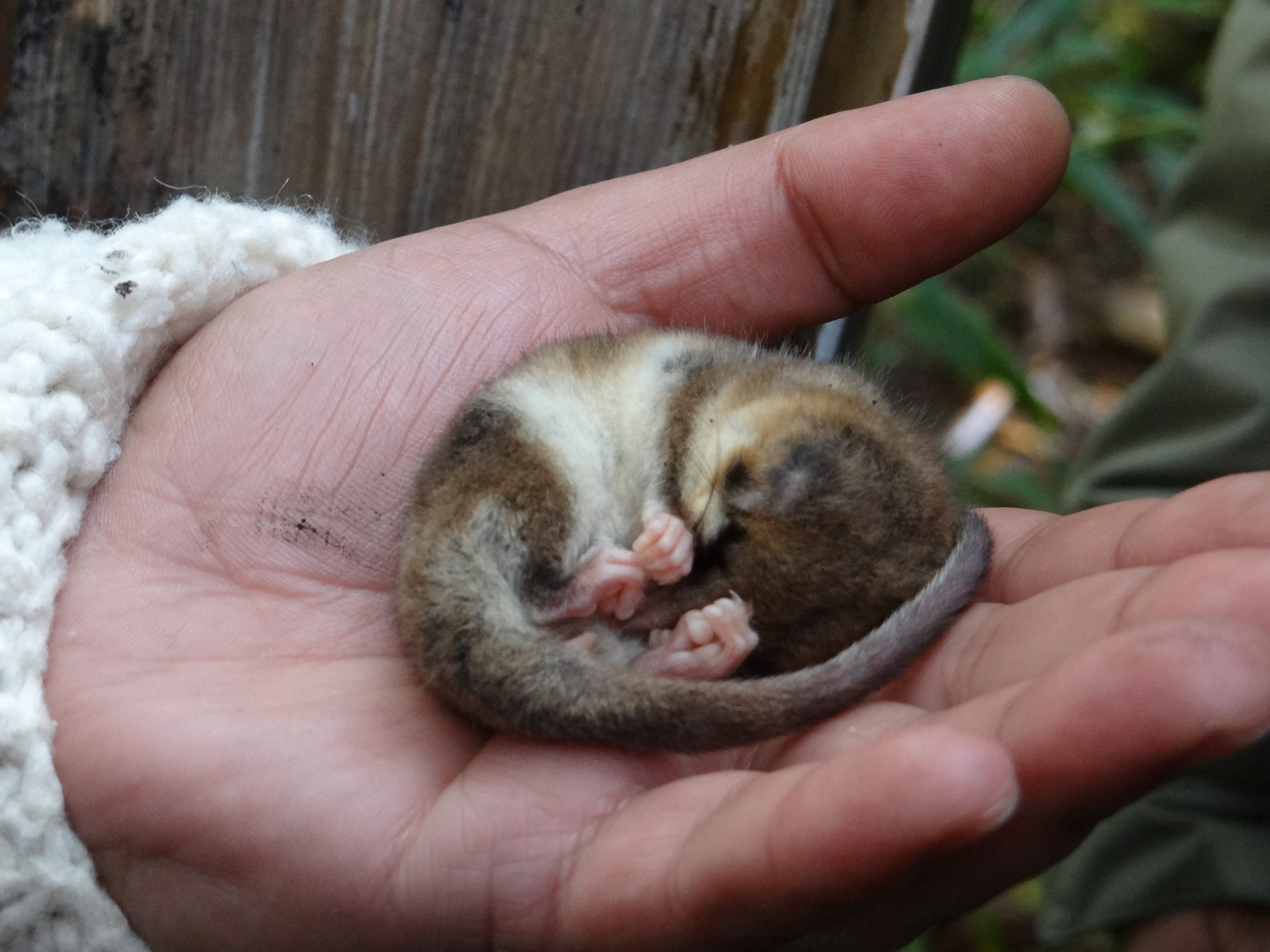 Monito del monte (Dromiciops gliroides) en estado de sopor invernal. Isla Grande de Chiloé, Chile.